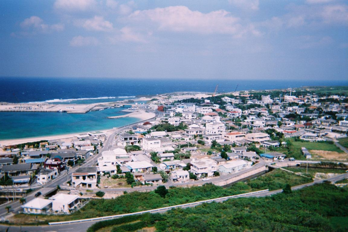 祖内地区（ティンダハナタから）（沖縄県八重山郡与那国島）